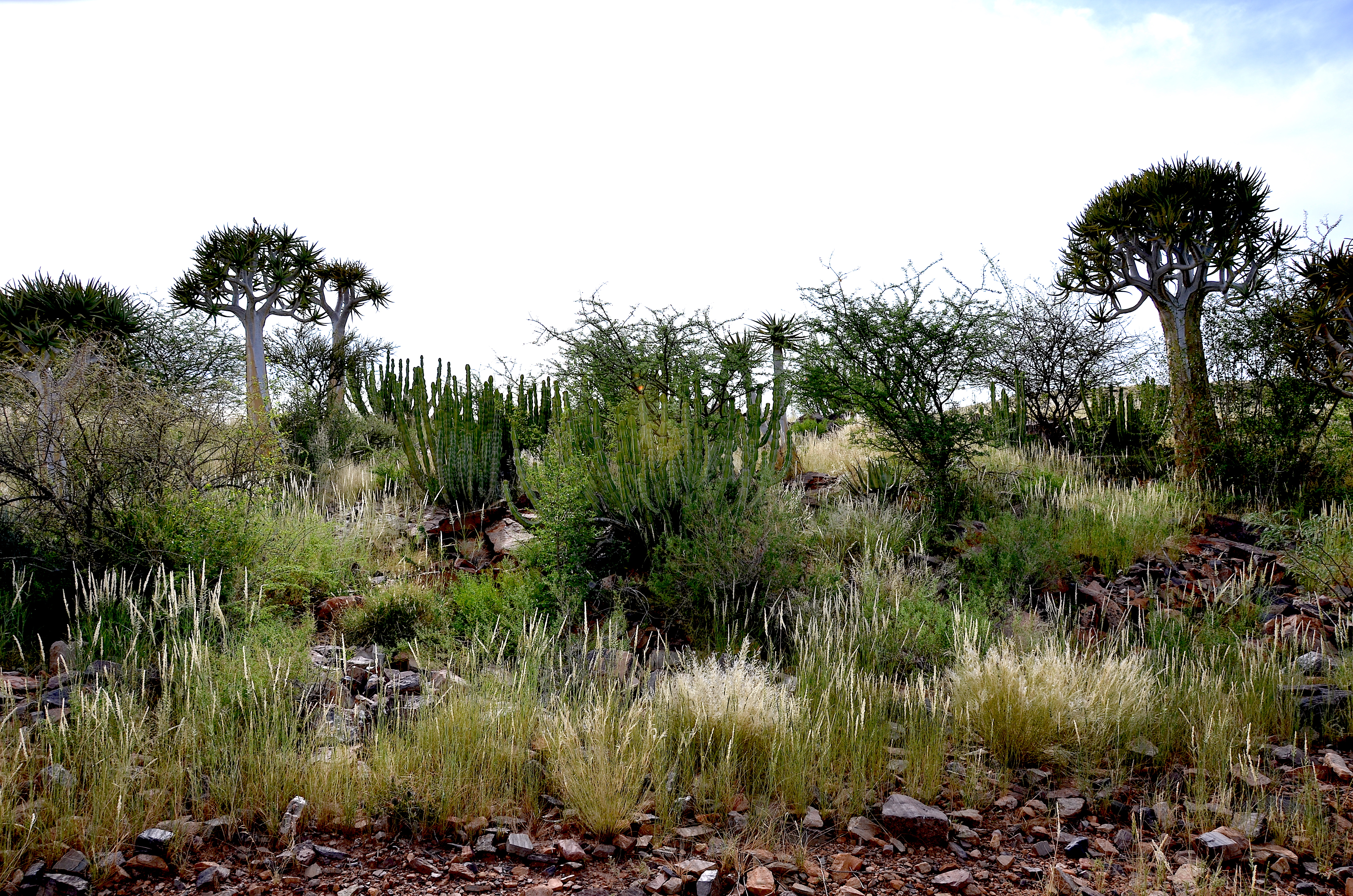 Pflanzenwelt nahe Keetmanshoop in Namibia